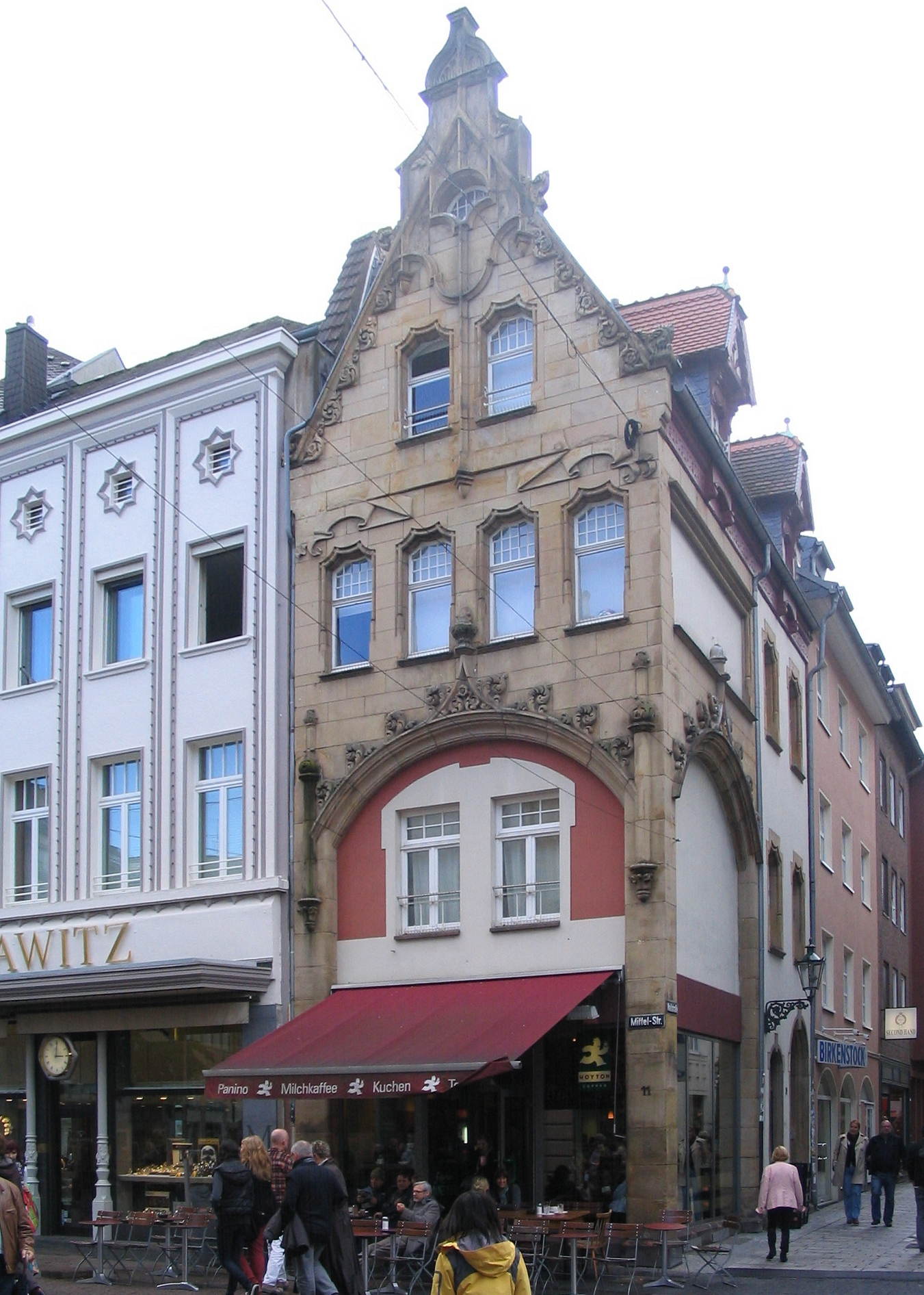 ehemaliges Schneidersches Geschäftshaus in Düsseldorf, Mittelstraße 11 / Wallstraße 29a; erbaut 1896 nach Entwurf des Düsseldorfer Architekten Hermann vom Endt; verändert; seit 1983 unter Denkmalschutz